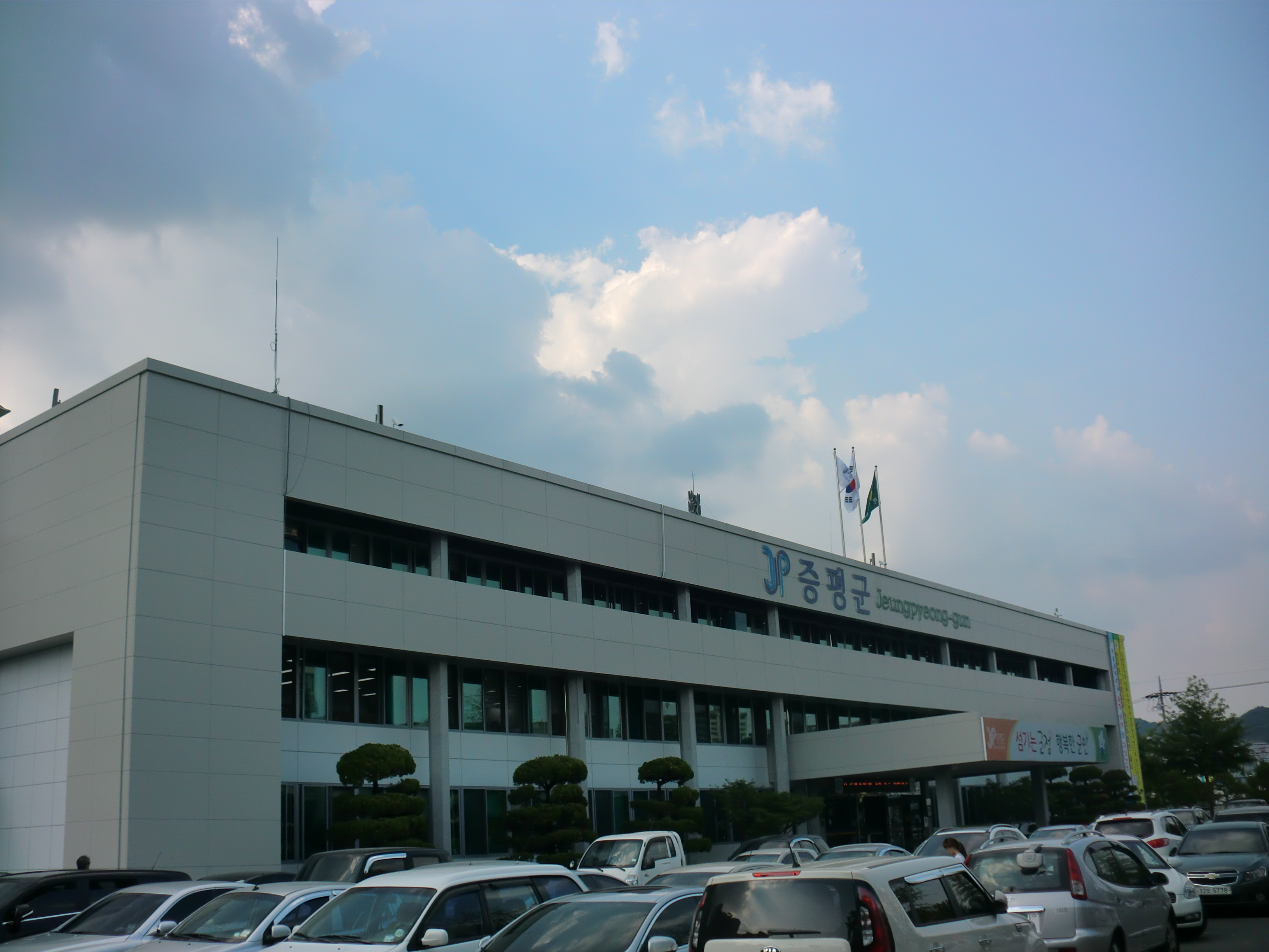 충청북도 증평군에 있는 증평군청